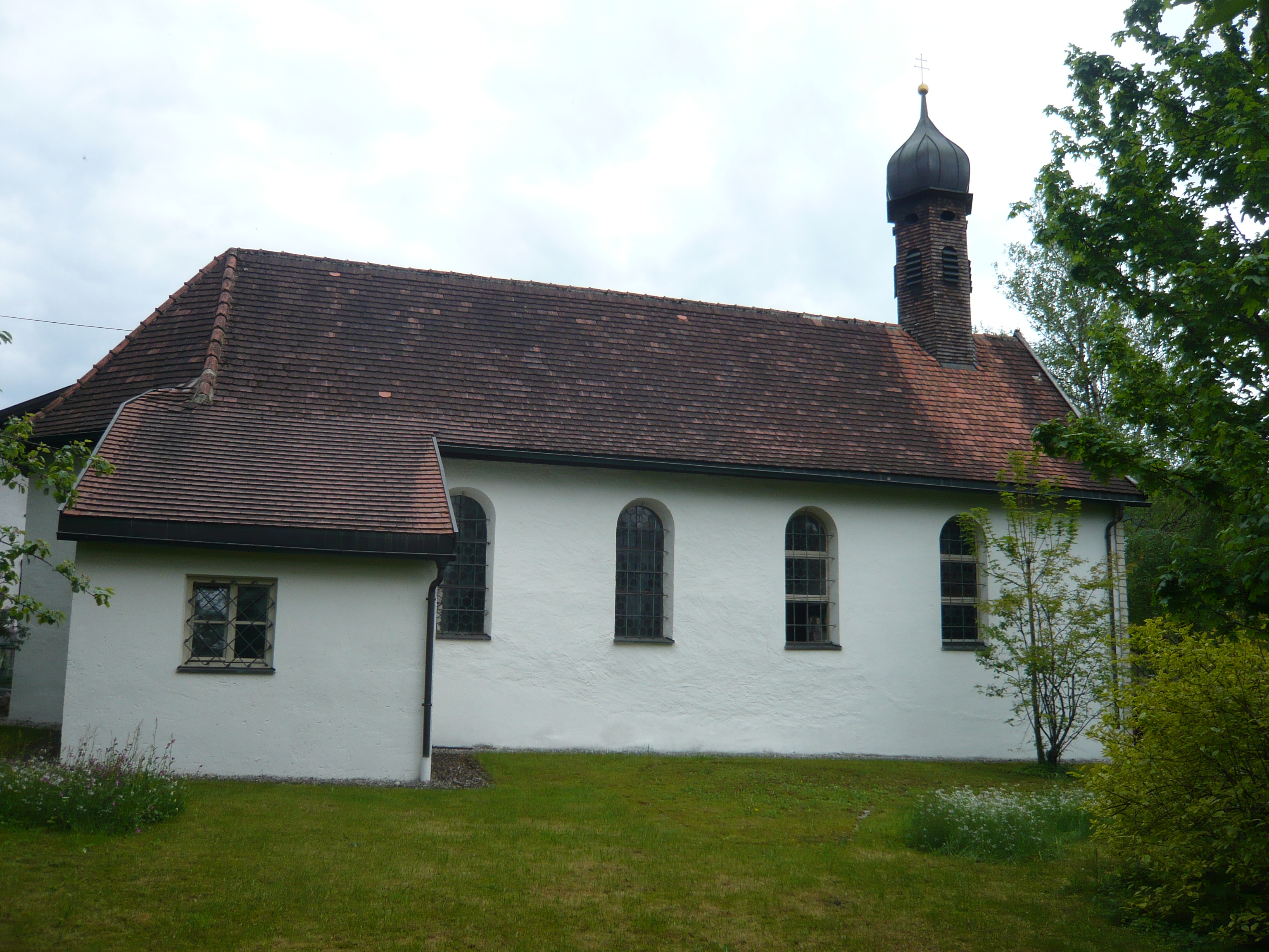 Kapelle St. Sebastian in Pfronten-Weißbach, Landkreis Ostallgäu (Ostseite mit Sakristei)